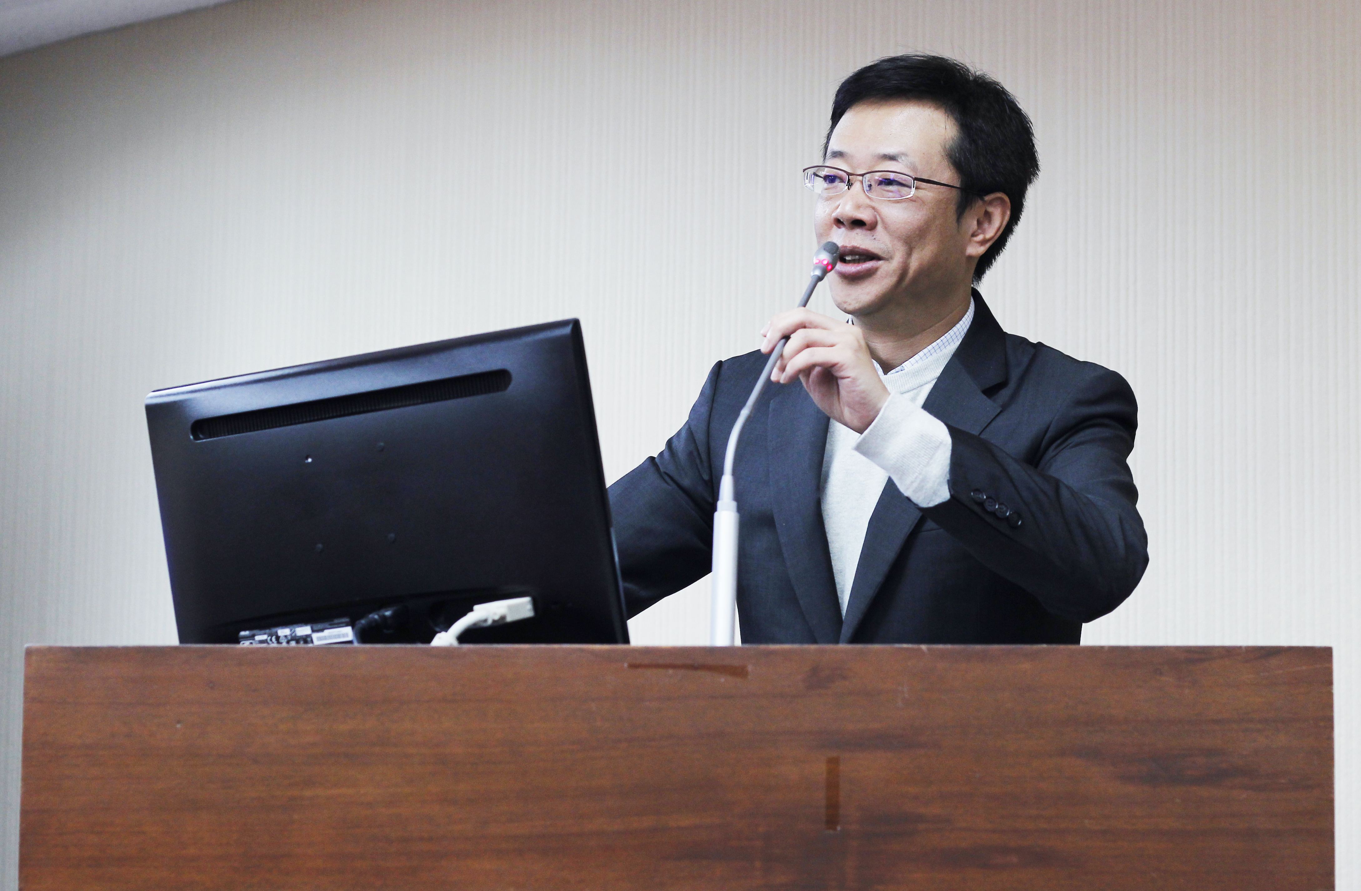 中文（台灣）: 張宏在立法院質詢時